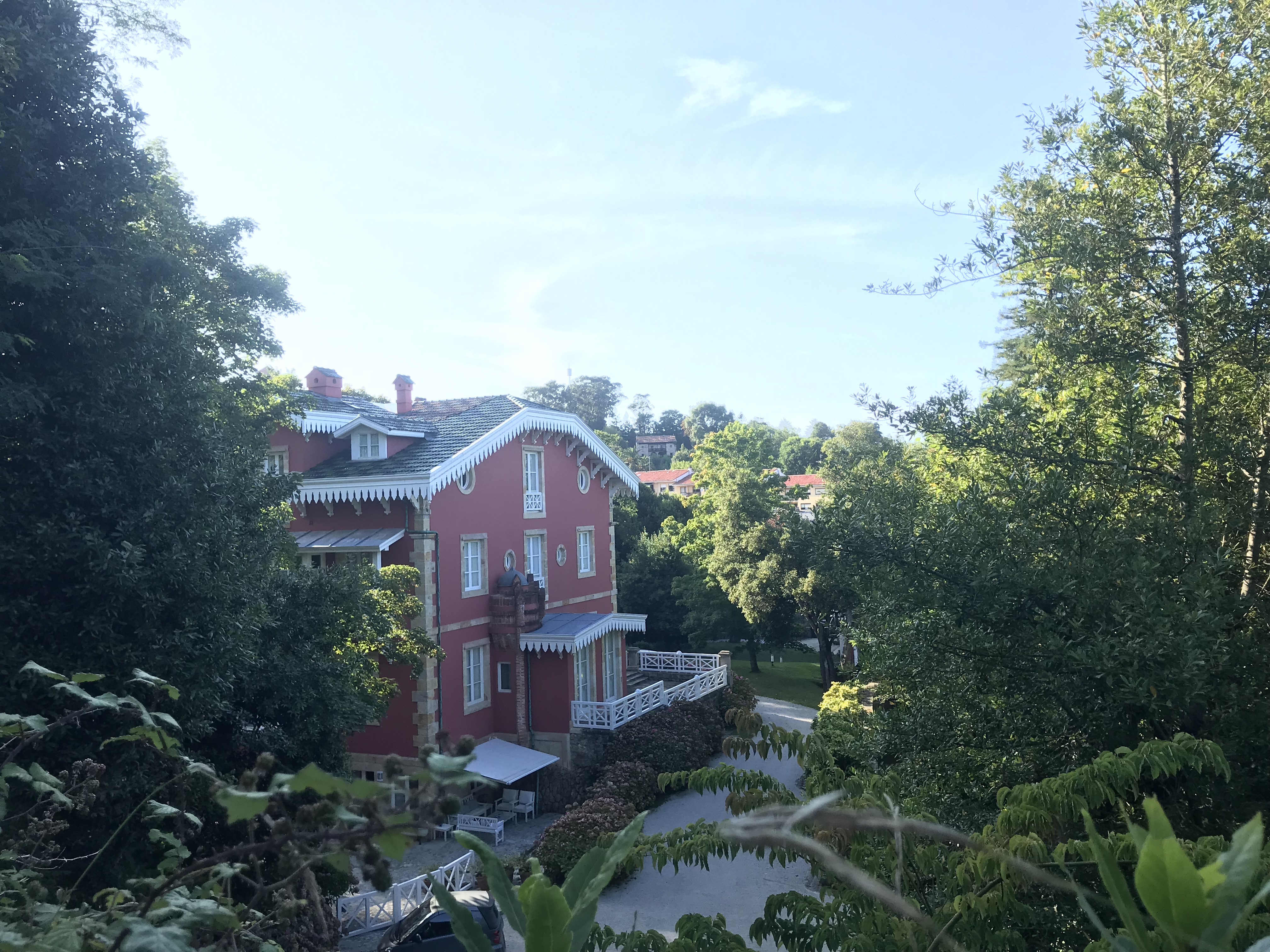 Vista de urbanización y edificaciones típicas de Comillas desde El Capricho